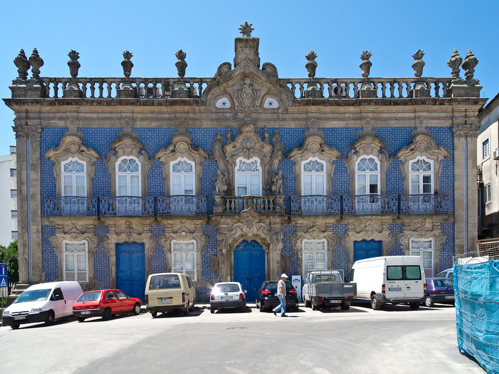 Portugal